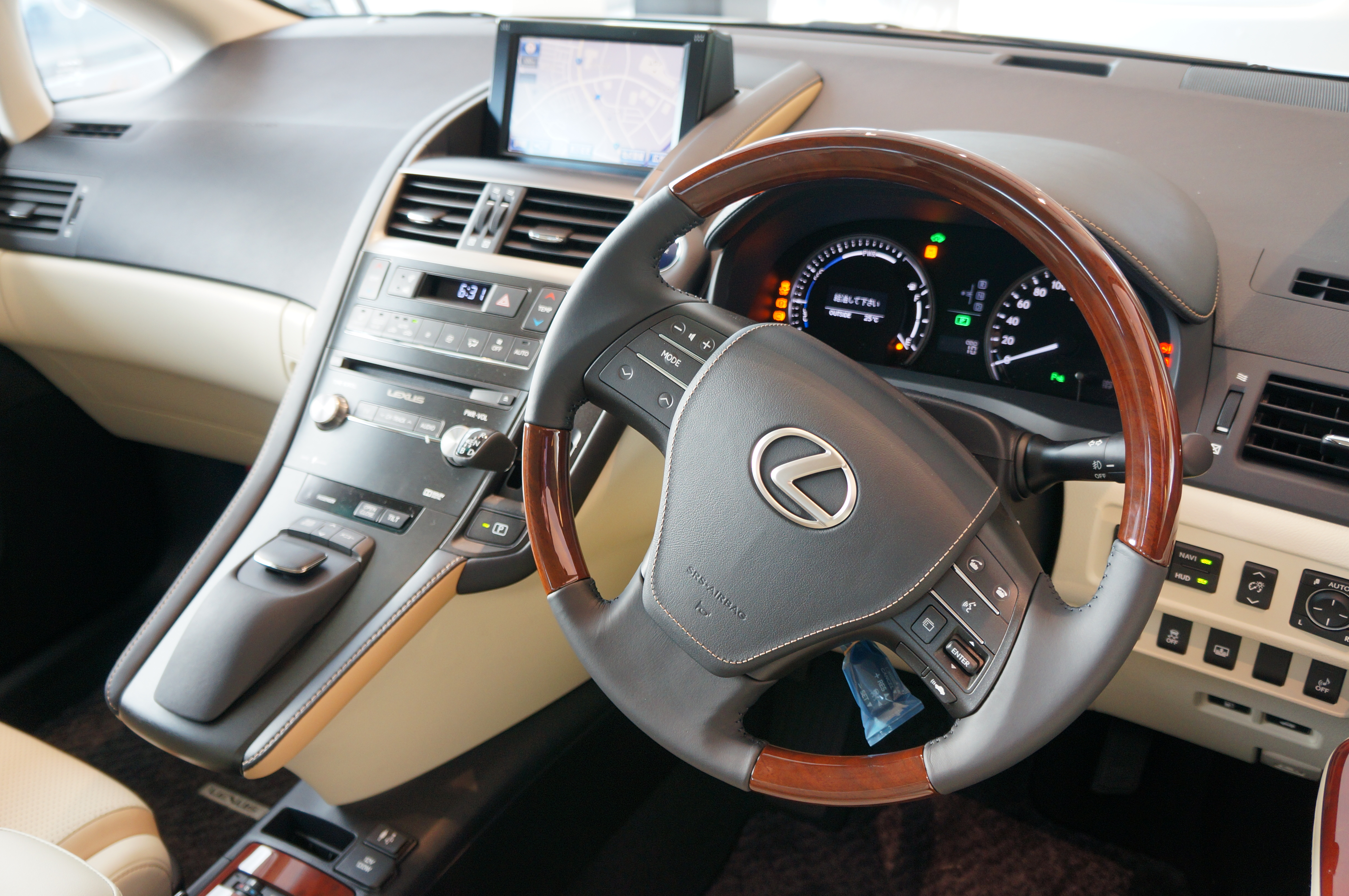 LEXUS HS250h 2013 interior japan